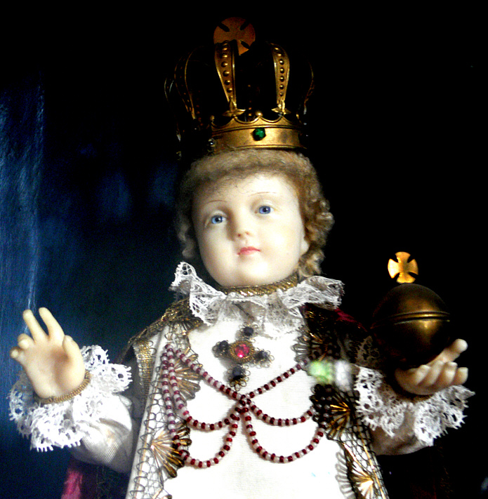 Kath. Pfarrkirche St. Michael, Ebersbach, Gemeinde Ebersbach-Musbach, Landkreis Ravensburg Prager Jesulein